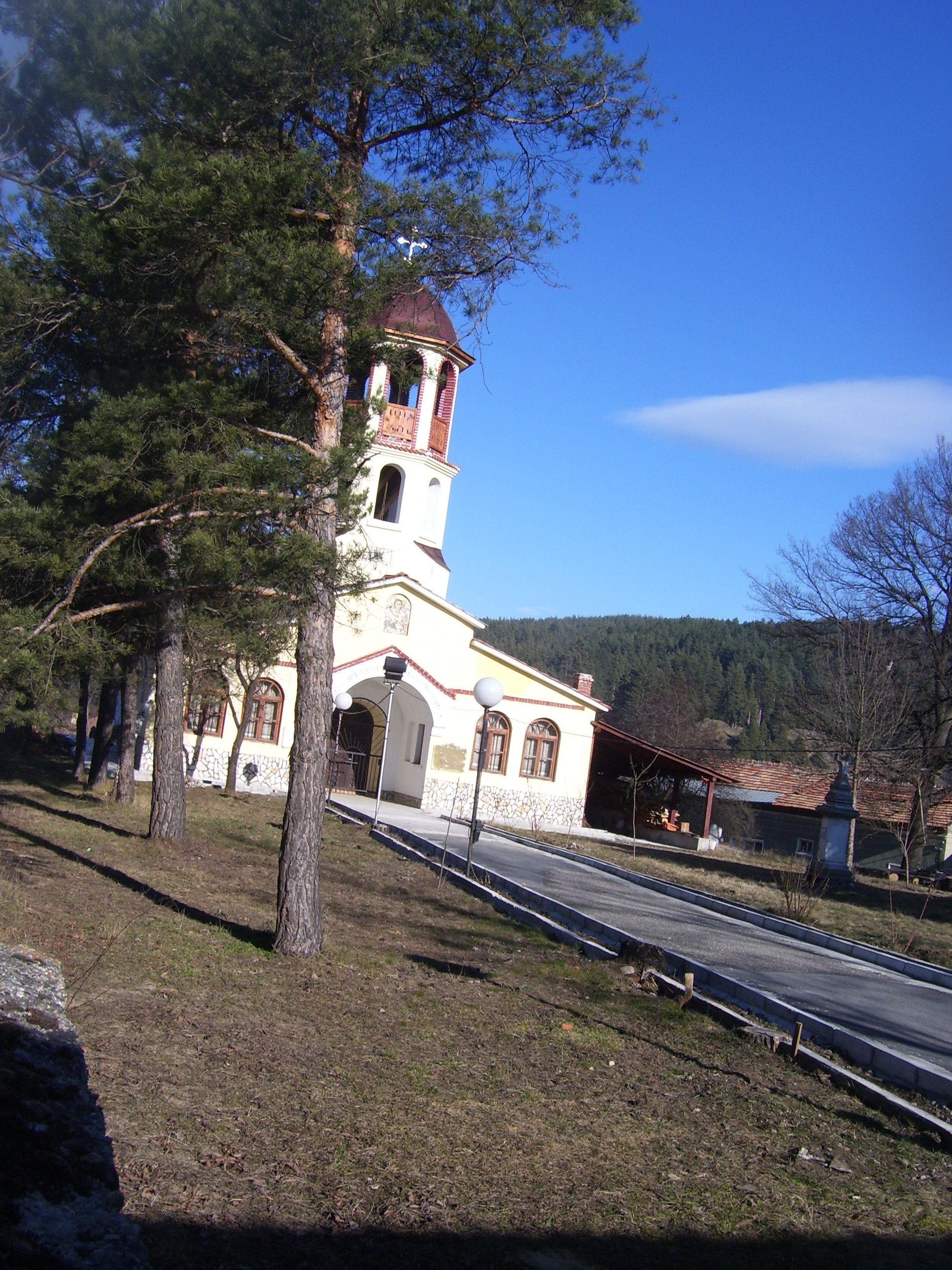 Църквата в село Баня, област Благоевград, България